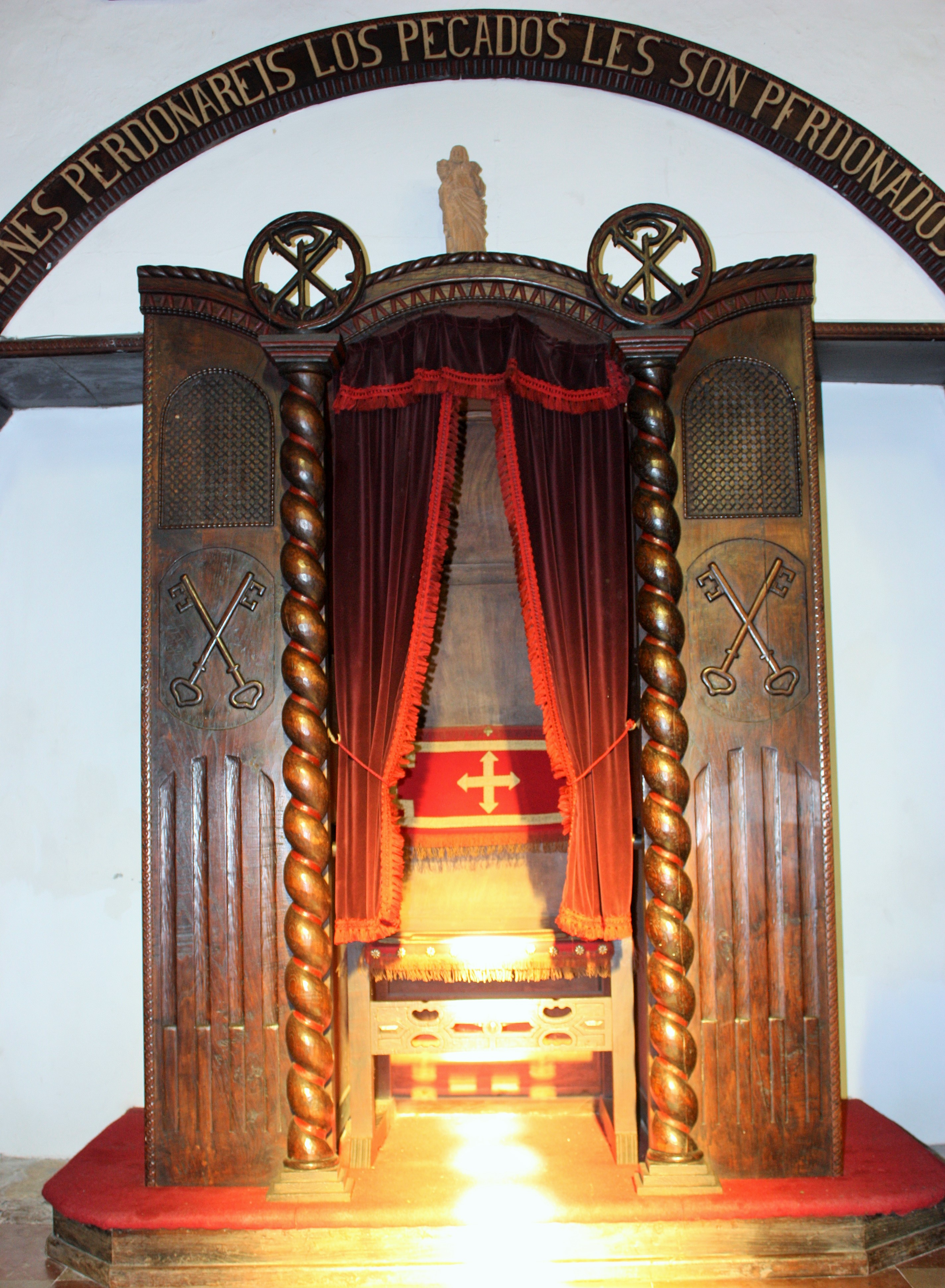 Santuario de Lugás. Villaviciosa. Asturias